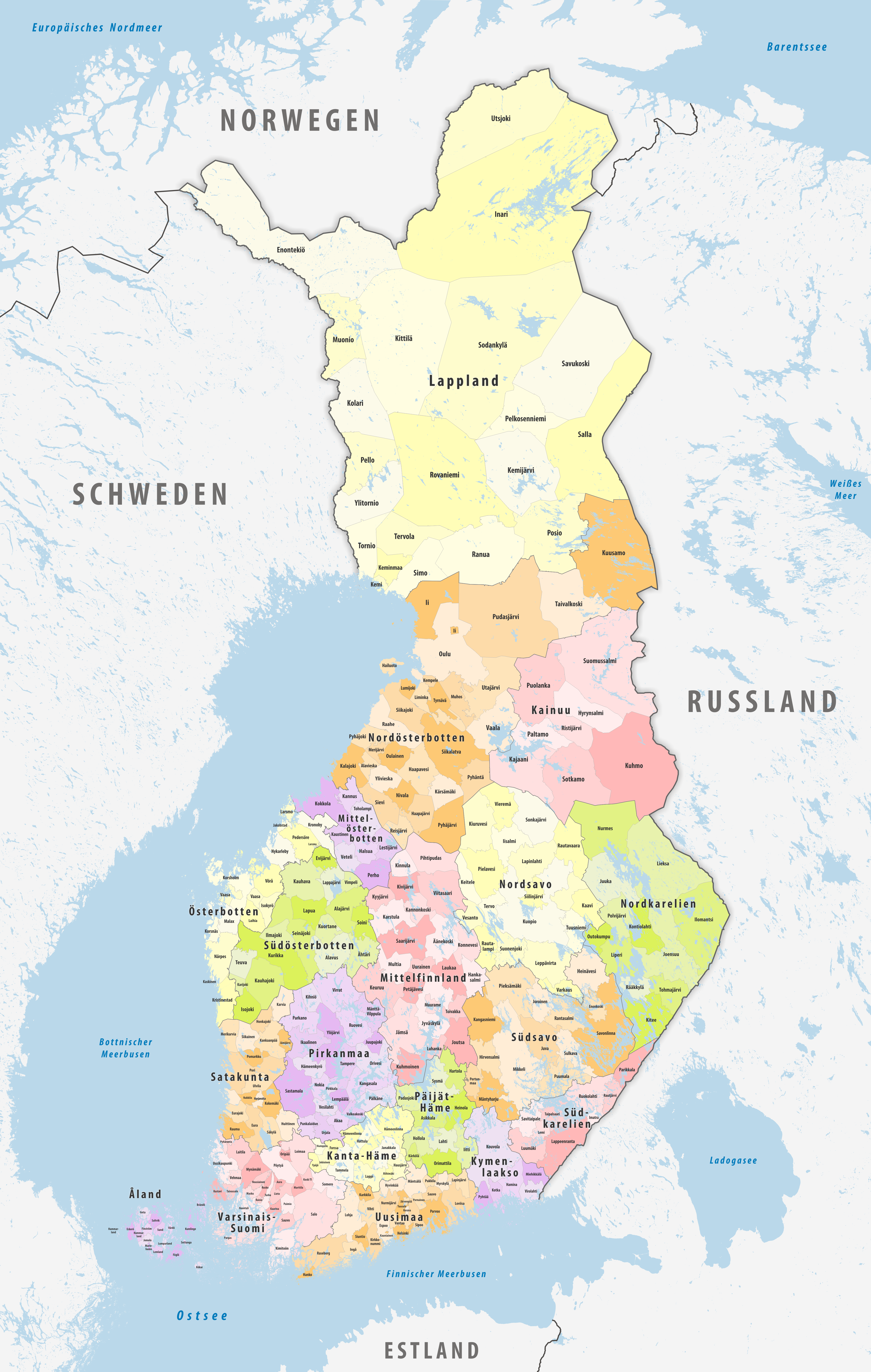 Politische Gliederung Finnlands